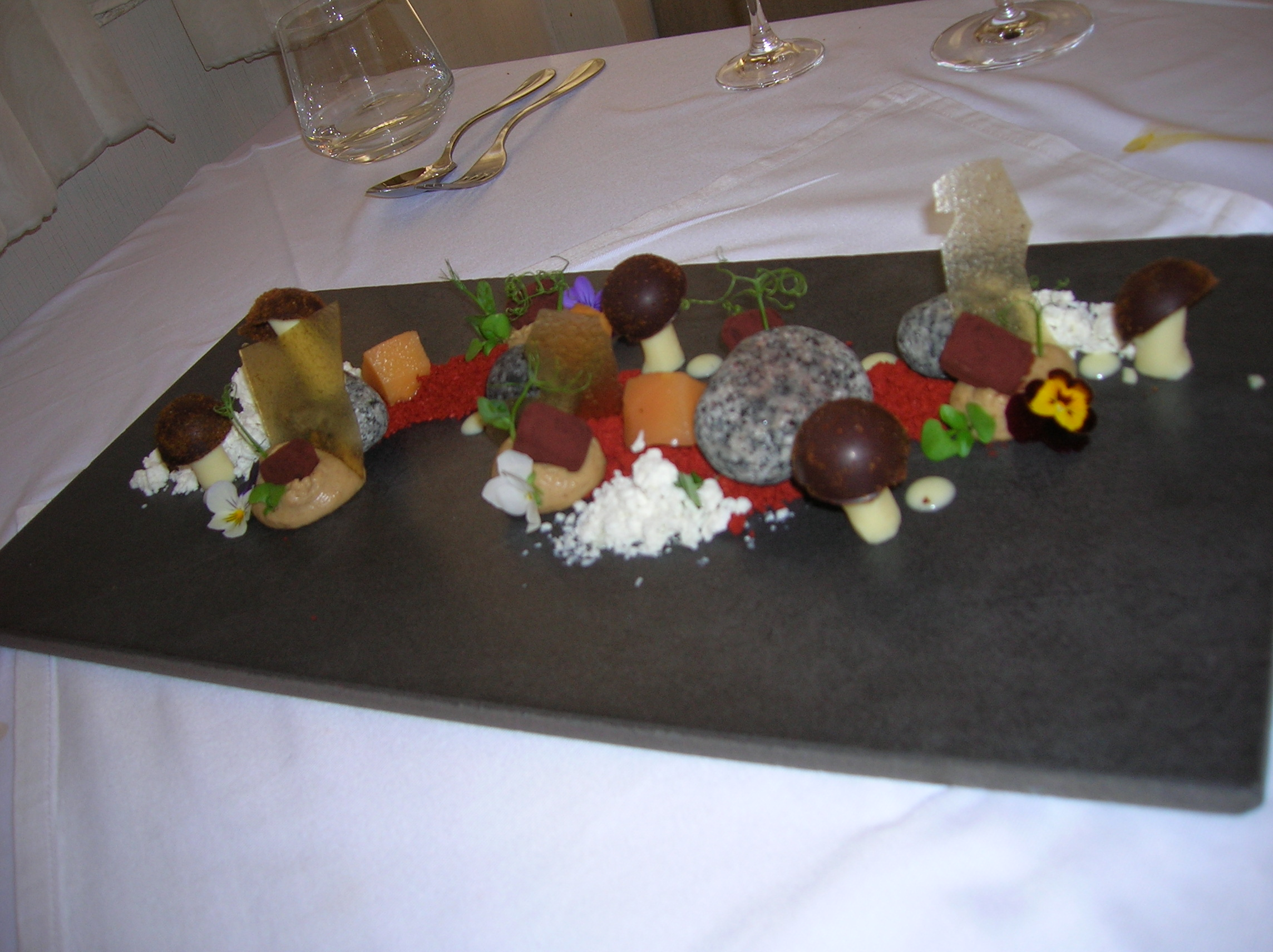 Catit 5